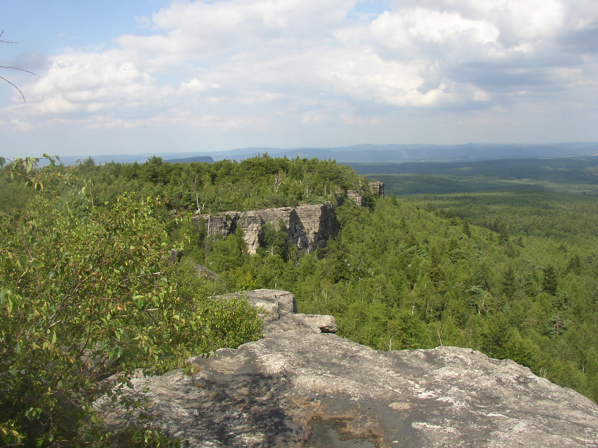 Pískovcové útesy na okrajích rozlehlé vrcholové plošiny Děčínský Sněžník (723 m). Pohled z jv. okraje vrcholu hory přibližně k severovýchodu.